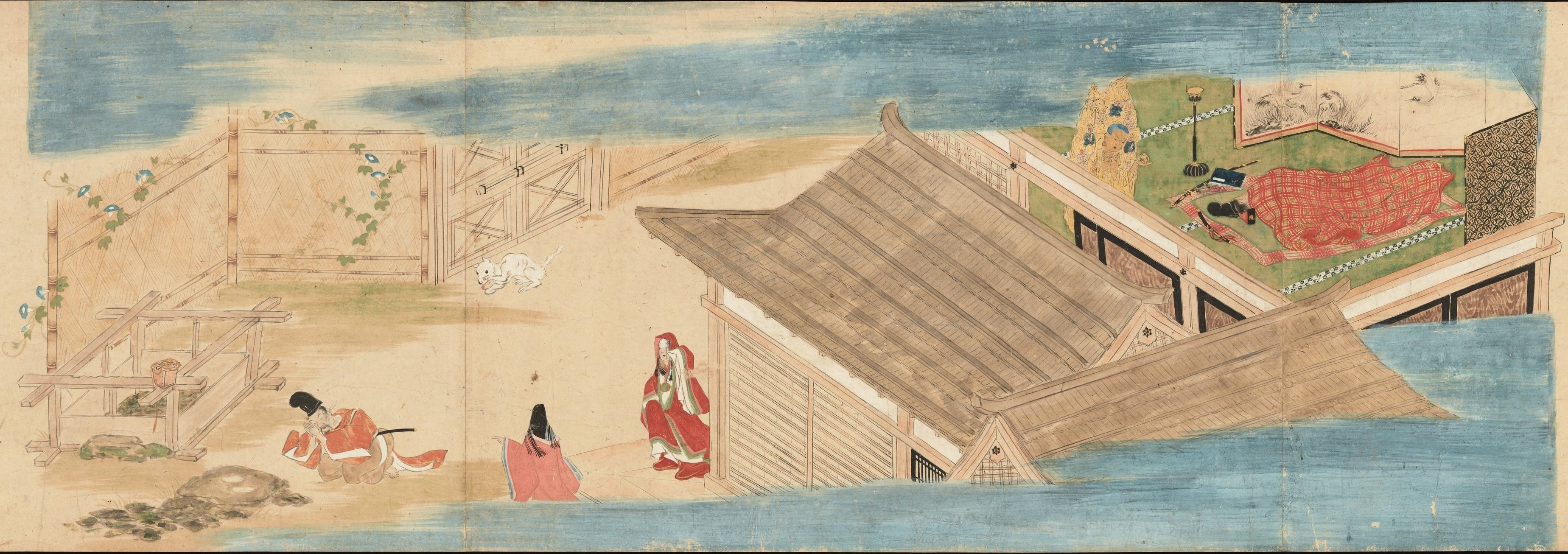 Seikō-ji engi emaki, rouleau 1, peinture 3